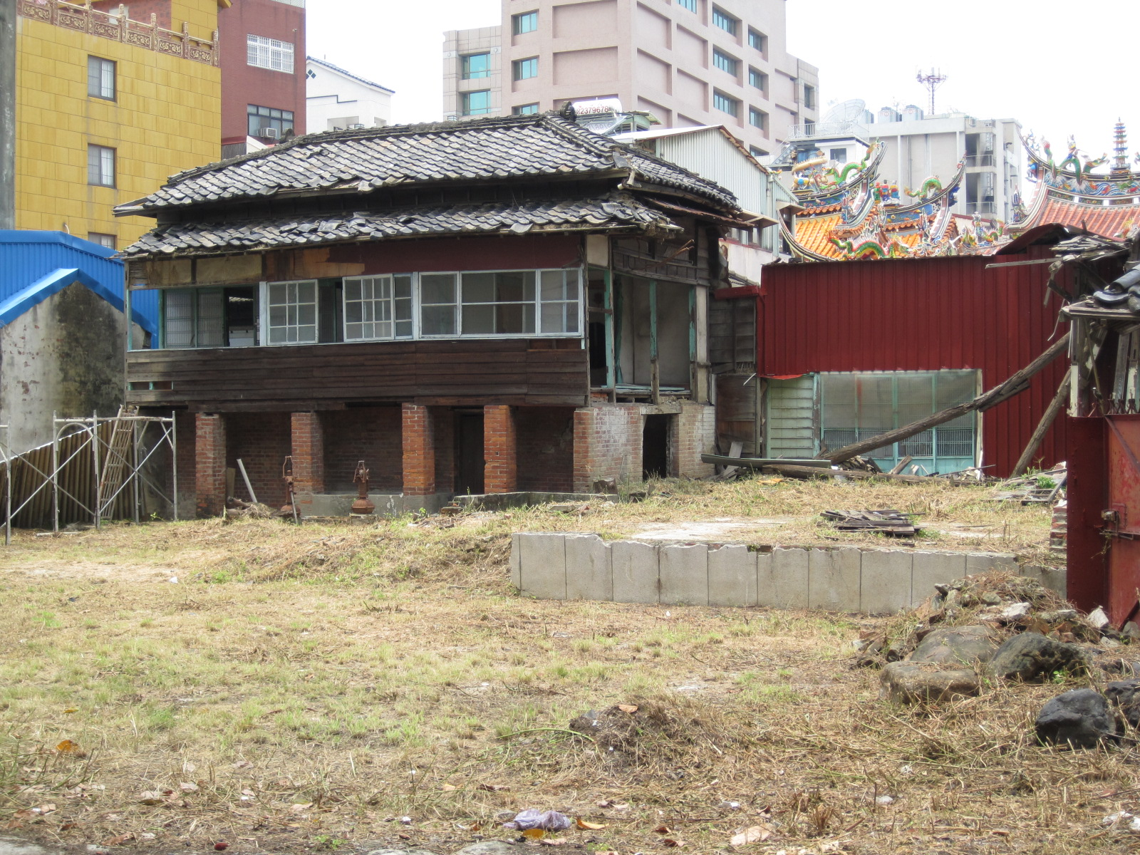 2010年所拍攝的鶯料理殘跡